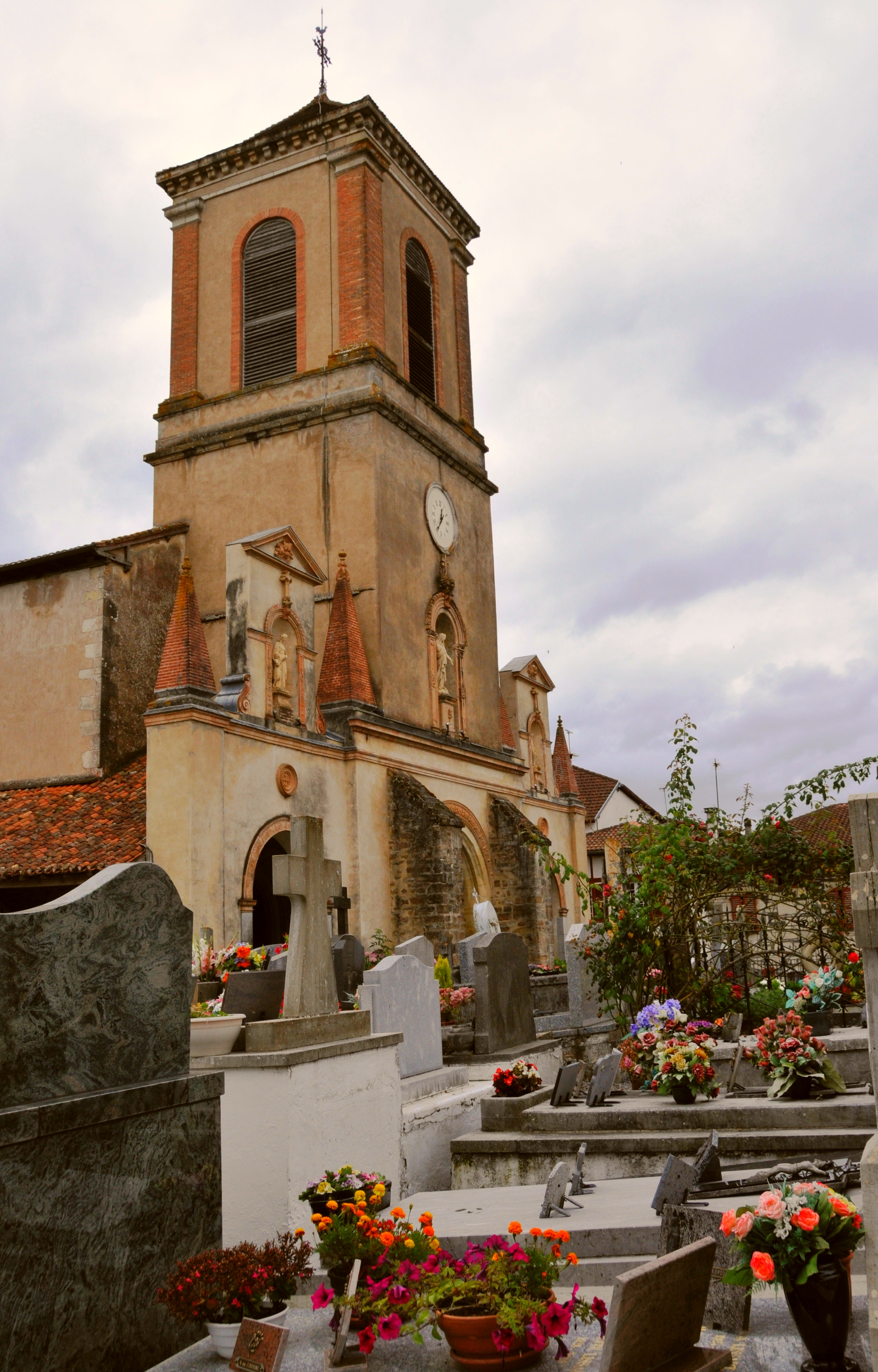 La-Bastide-Clairence, l'église